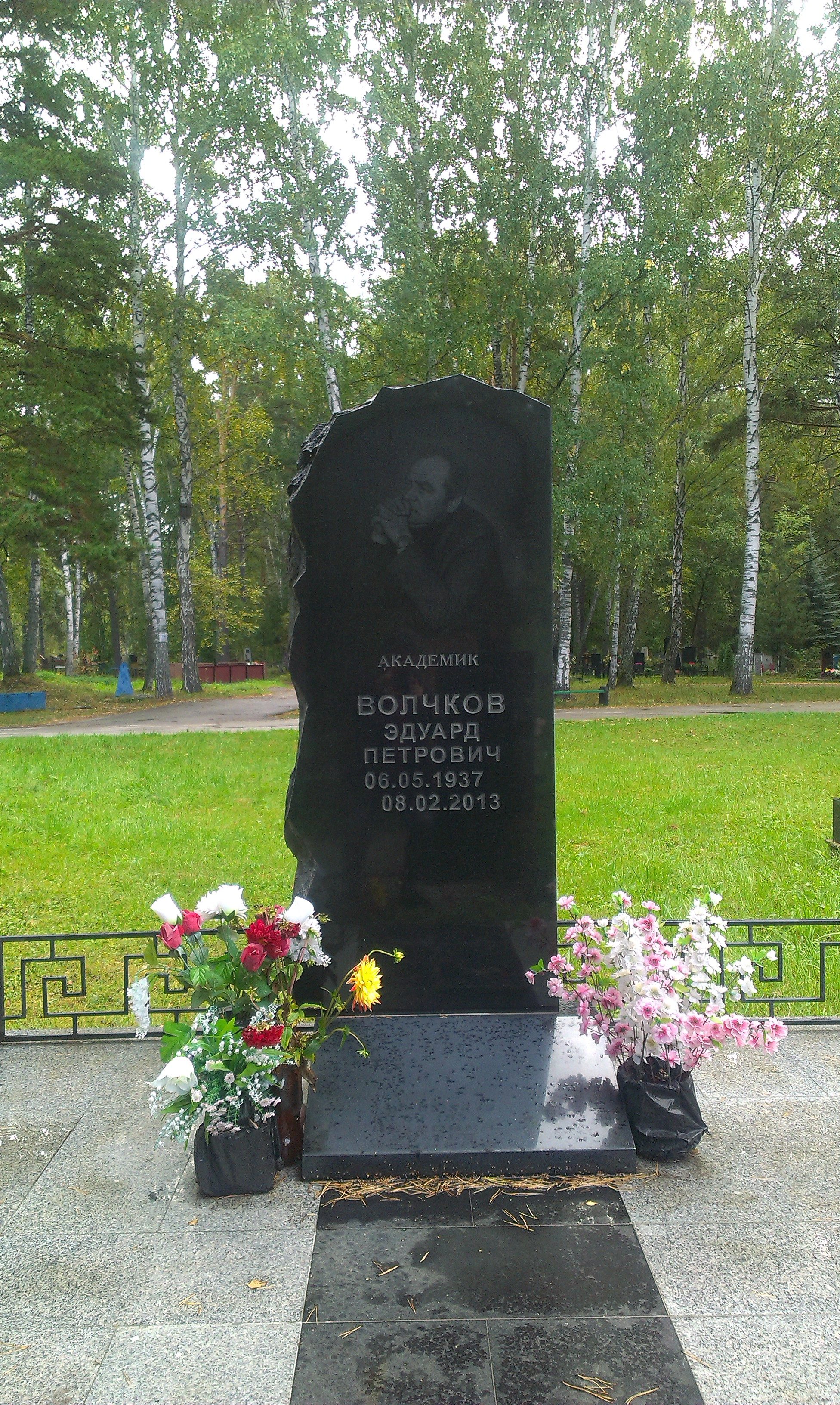 Южное (Чербузинское) кладбище